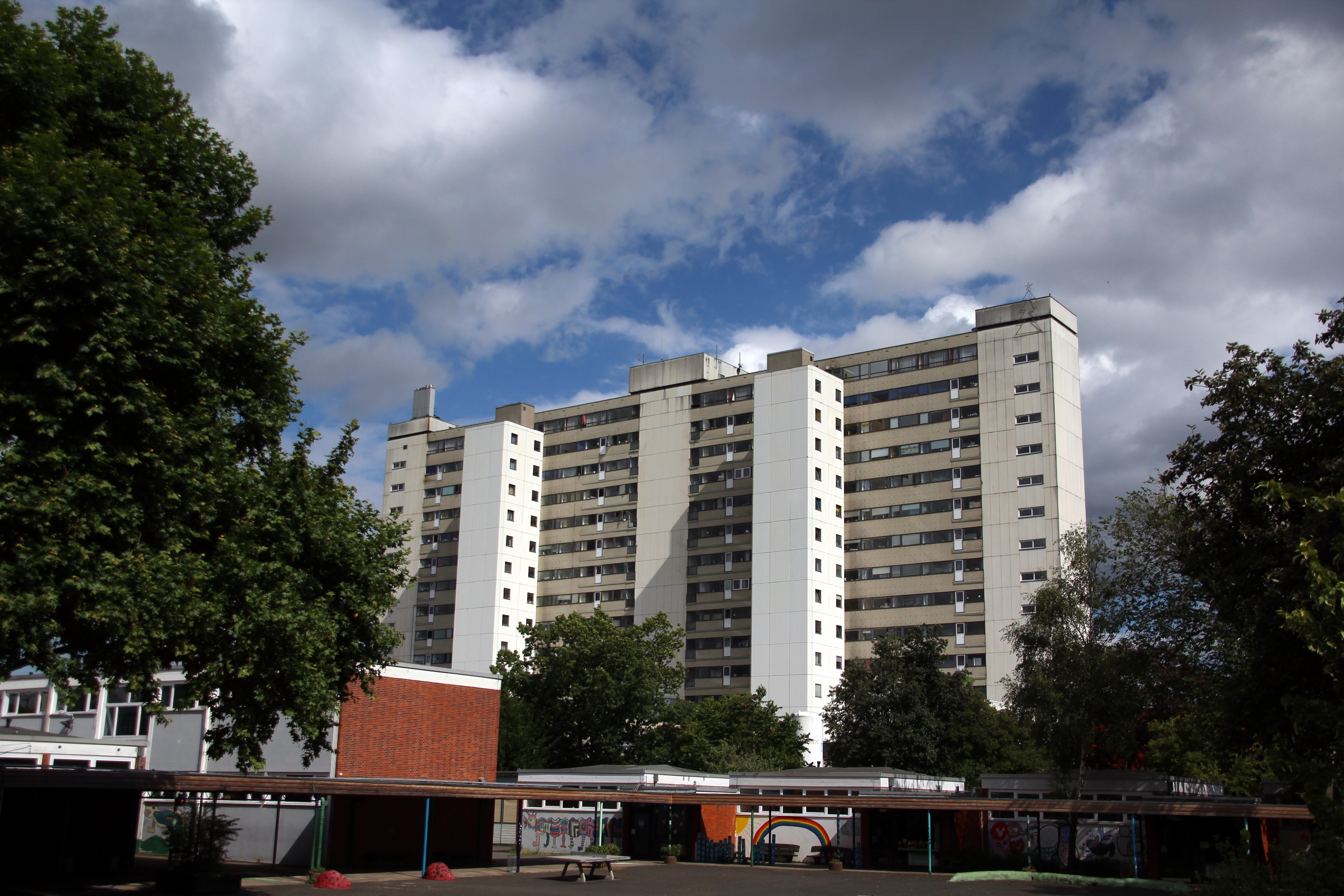 Bettenturm des Klinikums Höchst, Ansicht von Nordwest